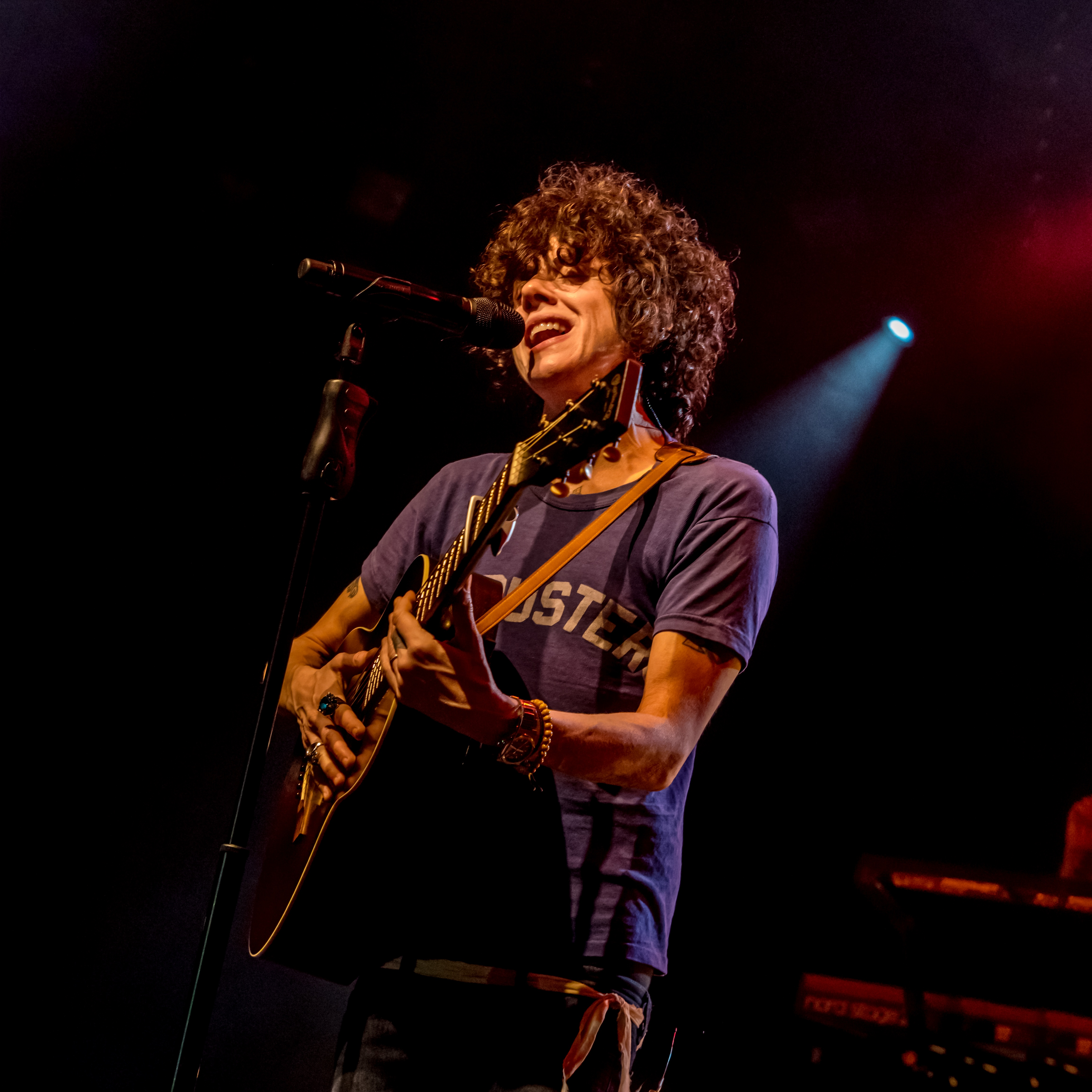 Bilder vom Zelt Musik Festival 2018 in Freiburg im Breisgau LP am 28.07.2018 im Zirkuszelt